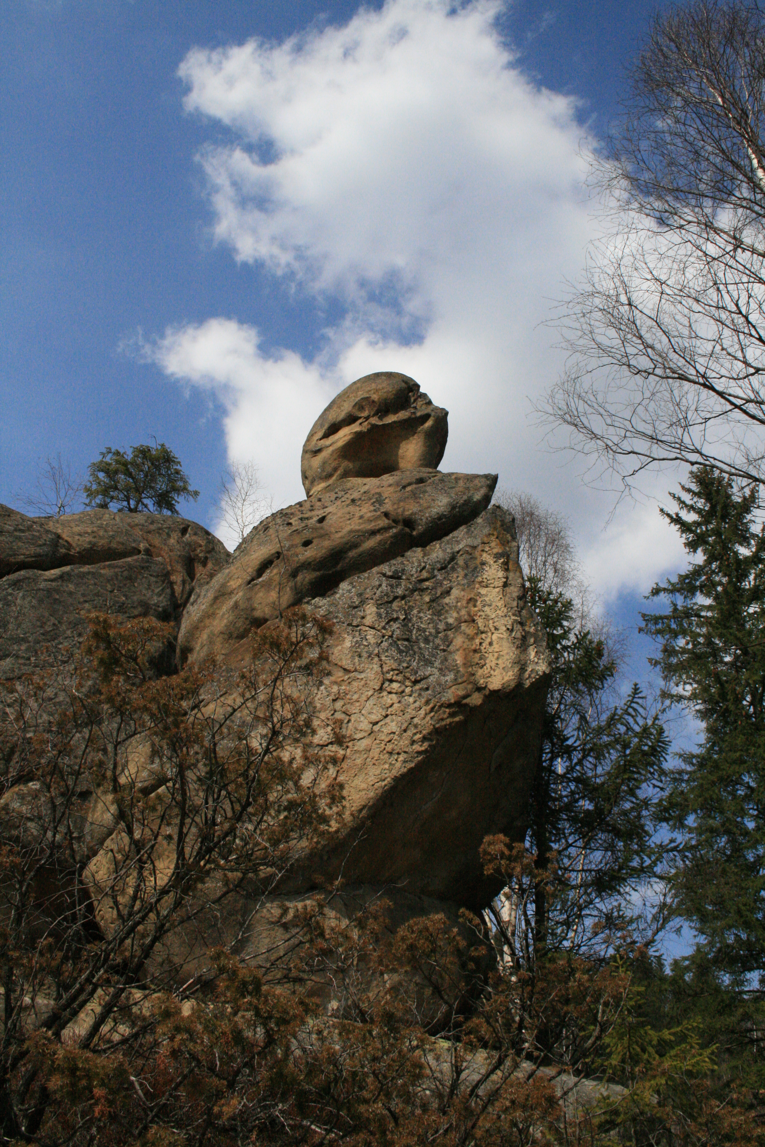 Терношорська Лада